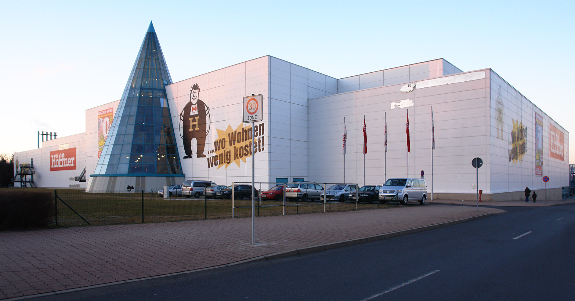 Höffner Möbelmarkt im Chemnitz Center